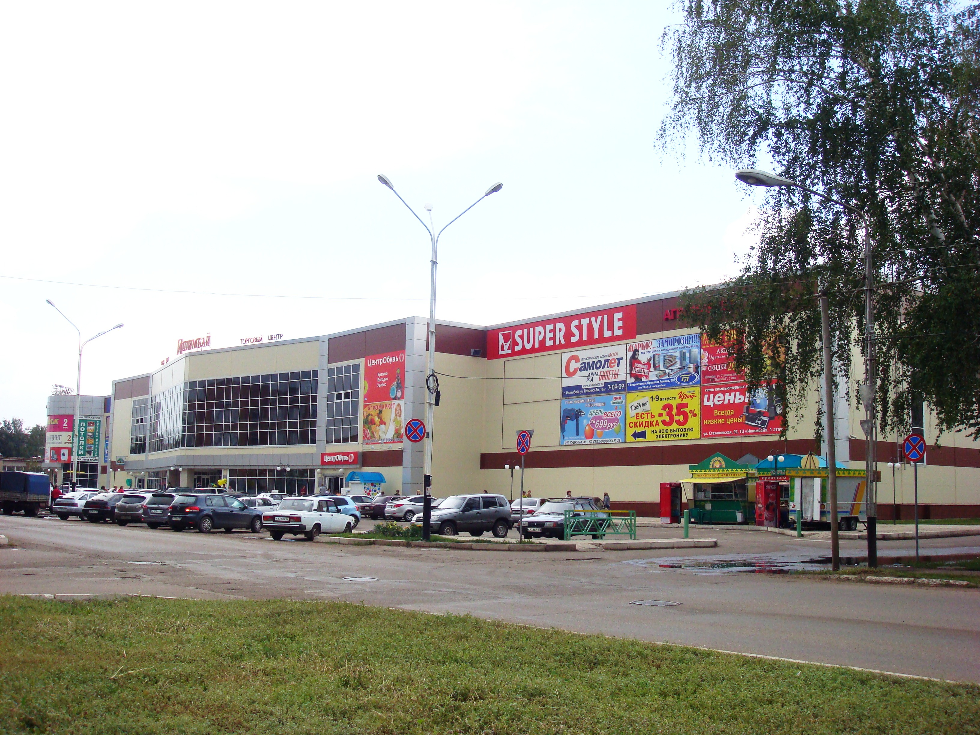 ТЦ "Иремель-Ишимбай"